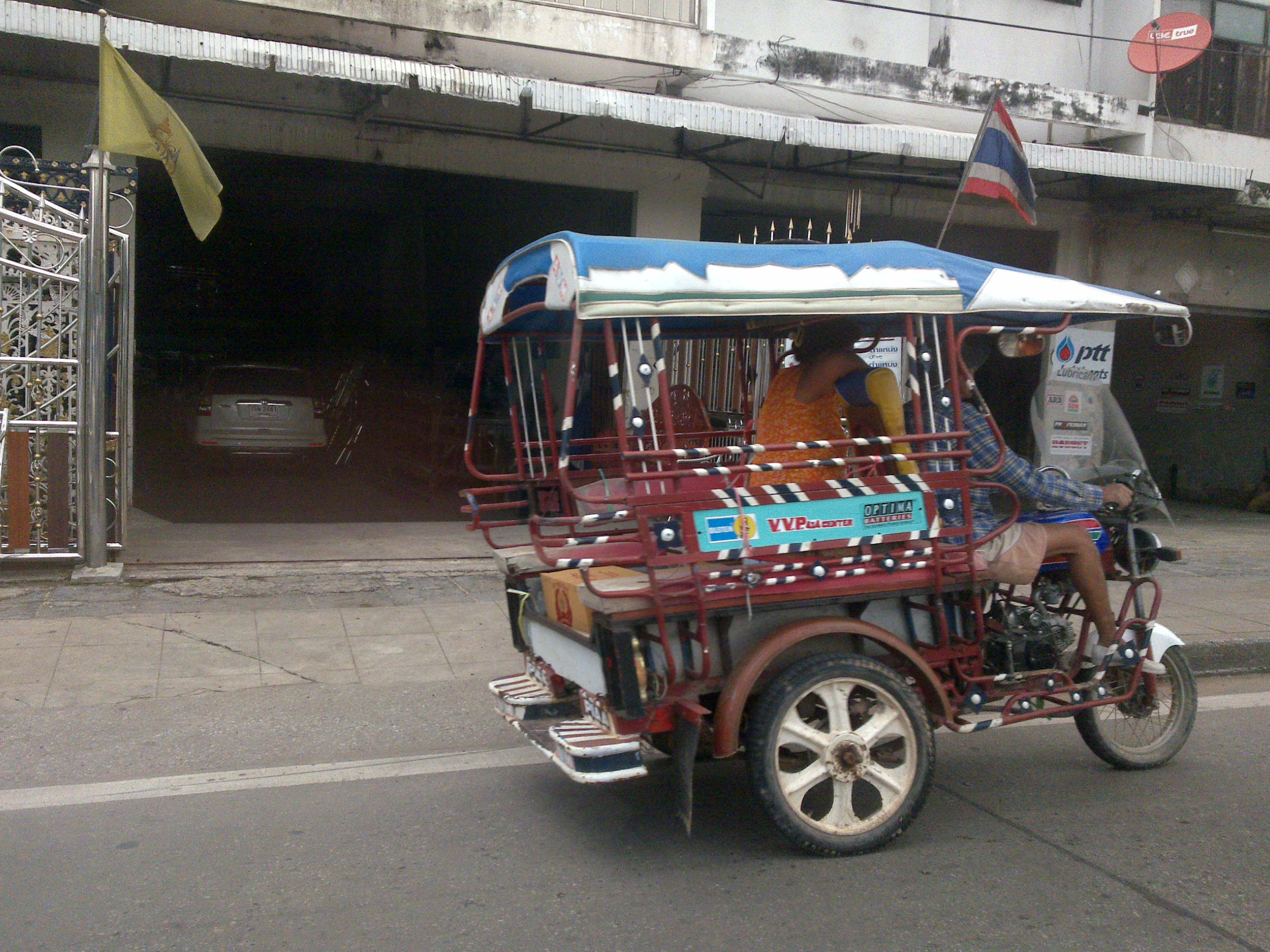 City of Nakhon Ratchasima, Thailand